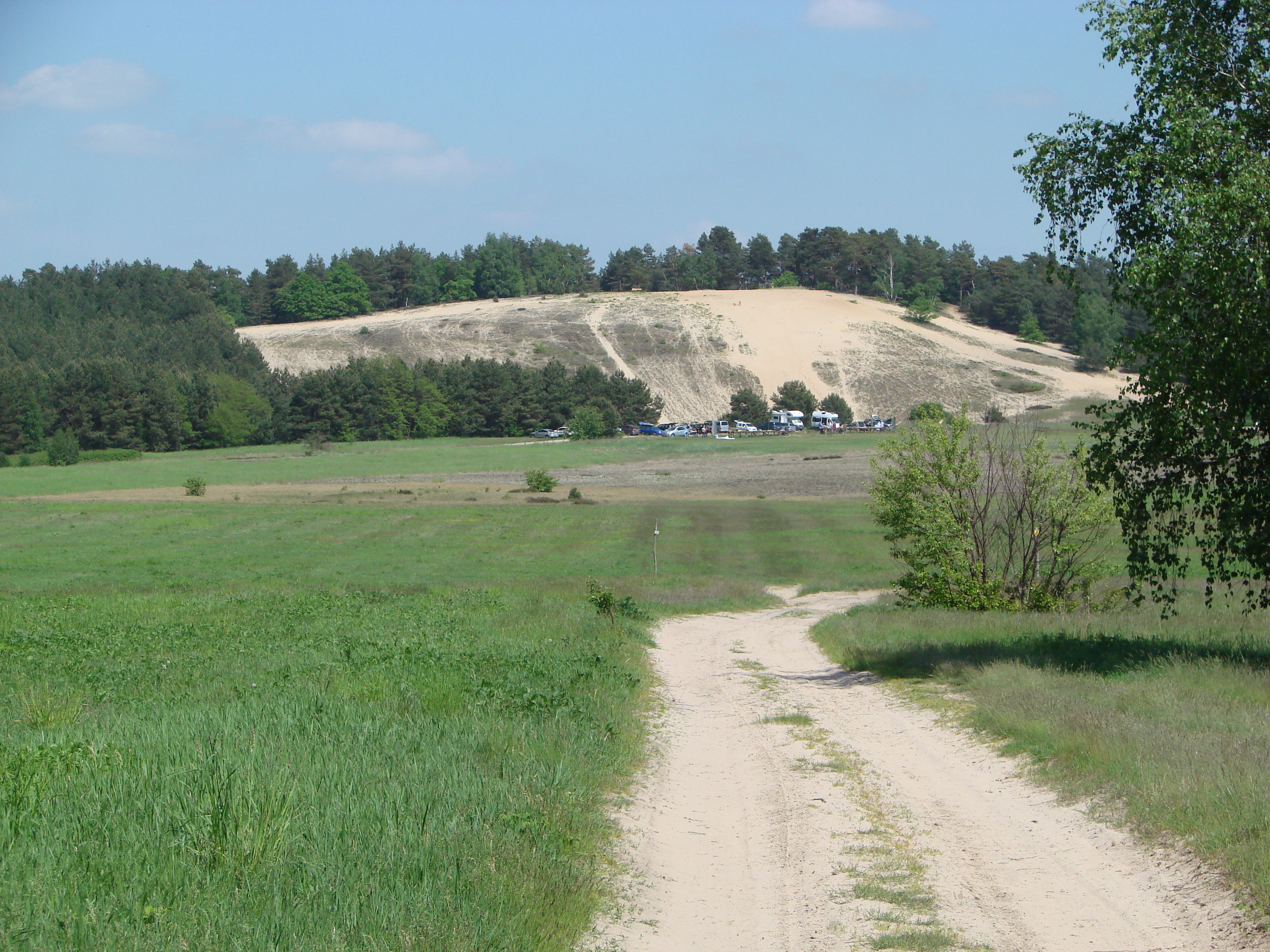 Der Eichberg gehört zum Saarmunder Endmoränenbogen